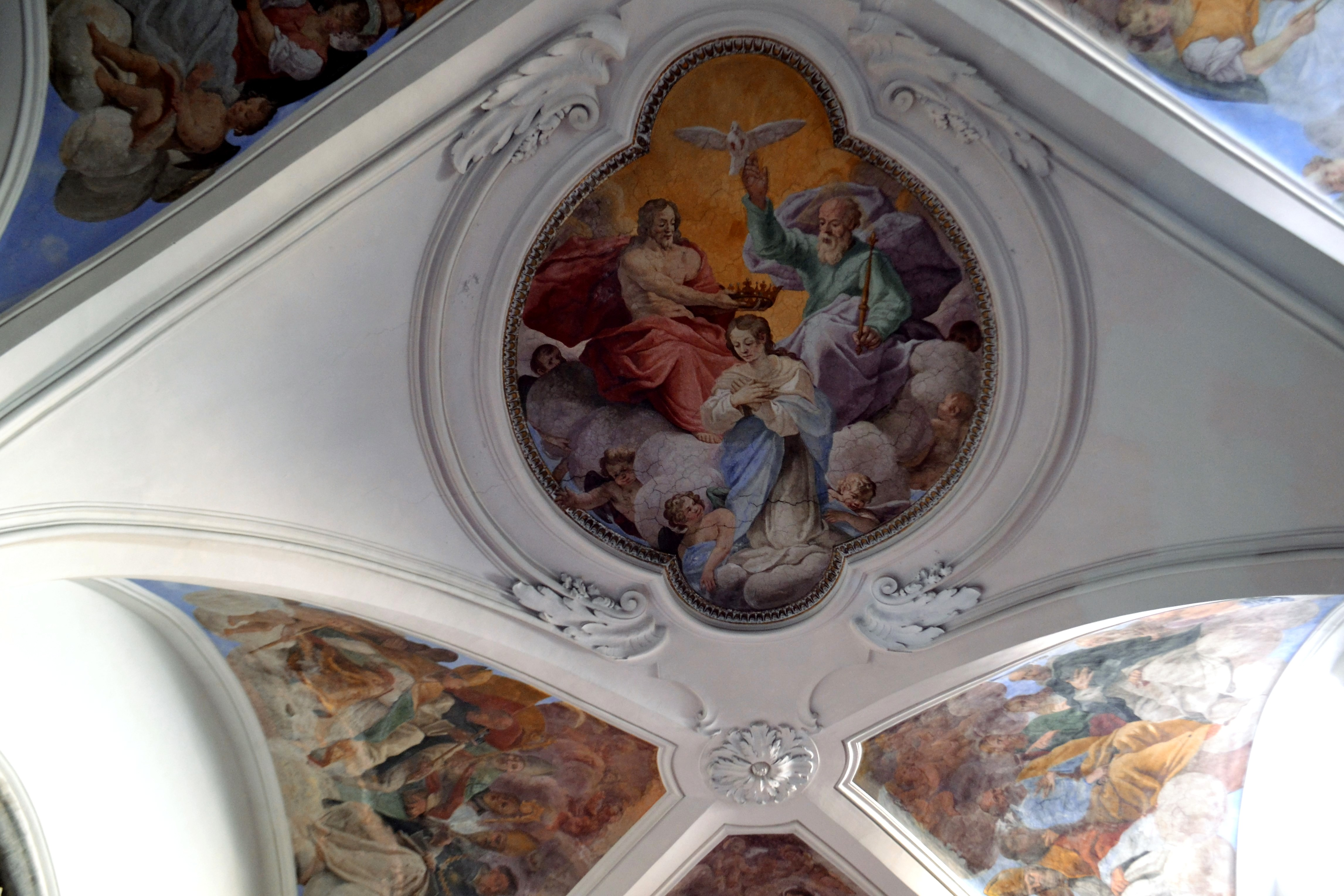 Incoronazione della Vergine, Michele Ragolia (XVII secolo) - Particolare della volta del cappellone del Crocifisso della chiesa di San Domenico Maggiore di Napoli